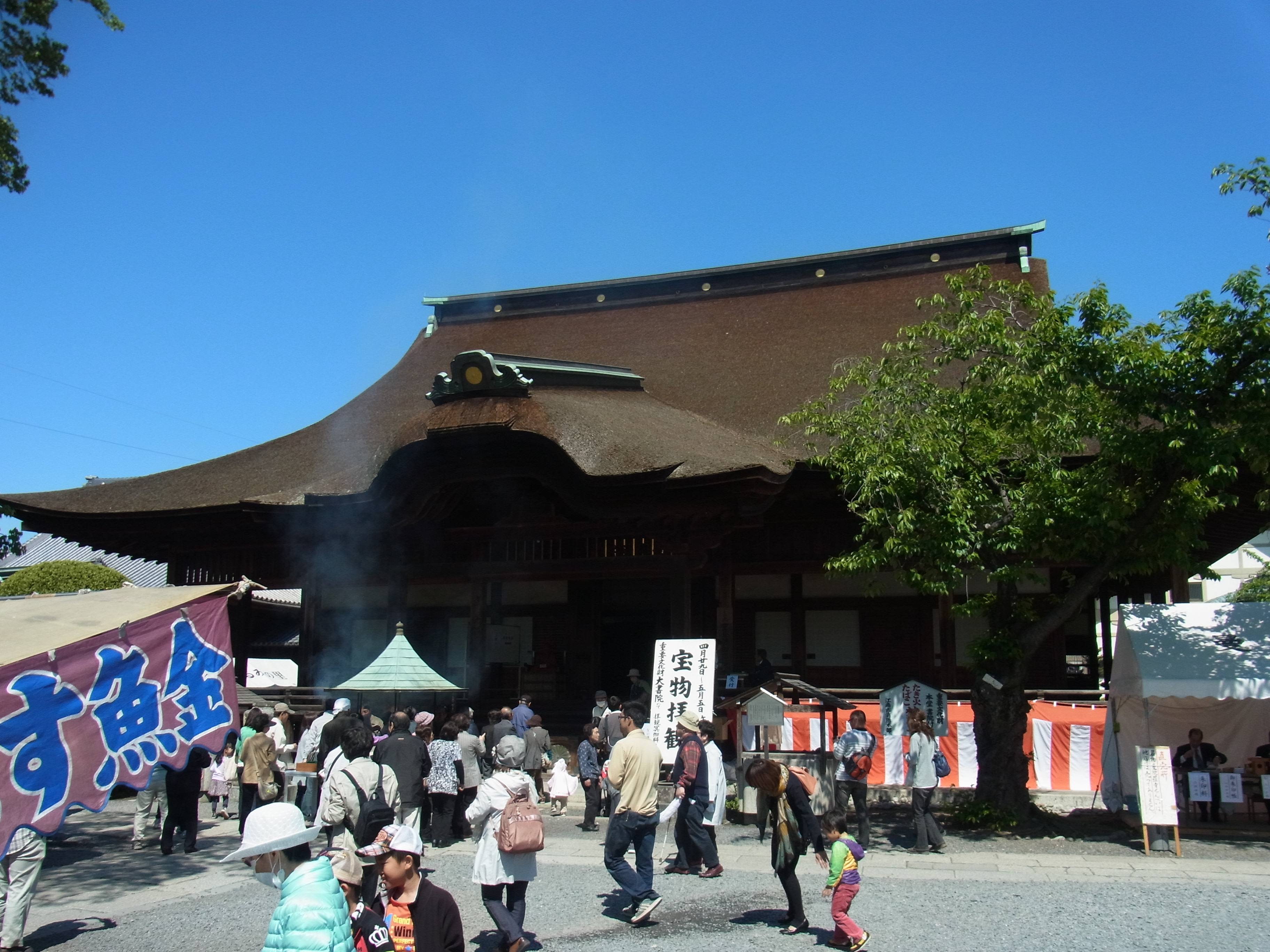 曼荼羅寺藤まつり